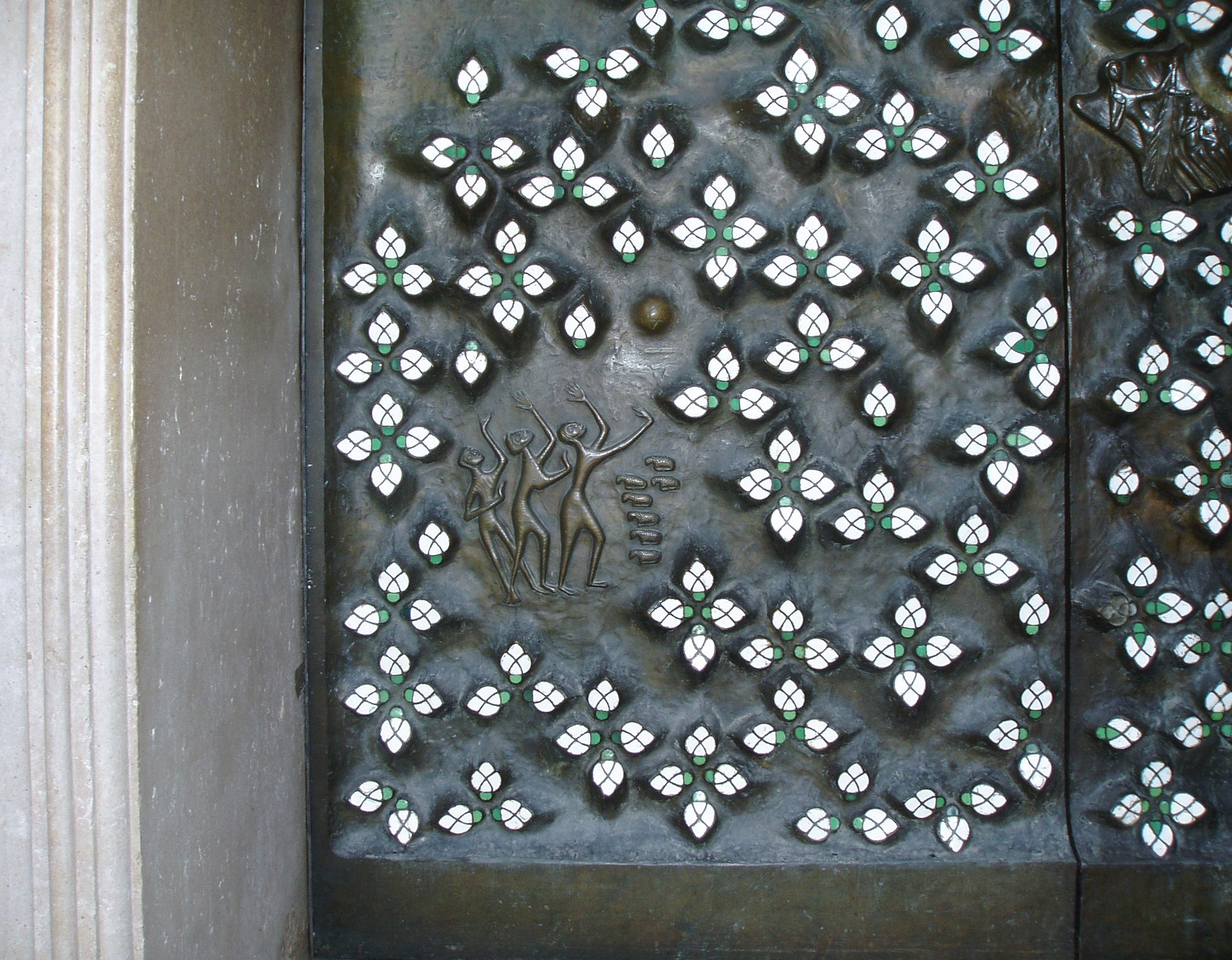 "Tor der Hoffnung". Rechte Bronzetür am Domportal des Salzburger Dom, geschaffen von Ewald Mataré (1887-1965) in 1957/58. Textquelle: V.Friedrich: "Der Dom zu den heiligen Rupert und Virgil in Salzburg ISBN 978-3-89643-676-4. Bild: selbst